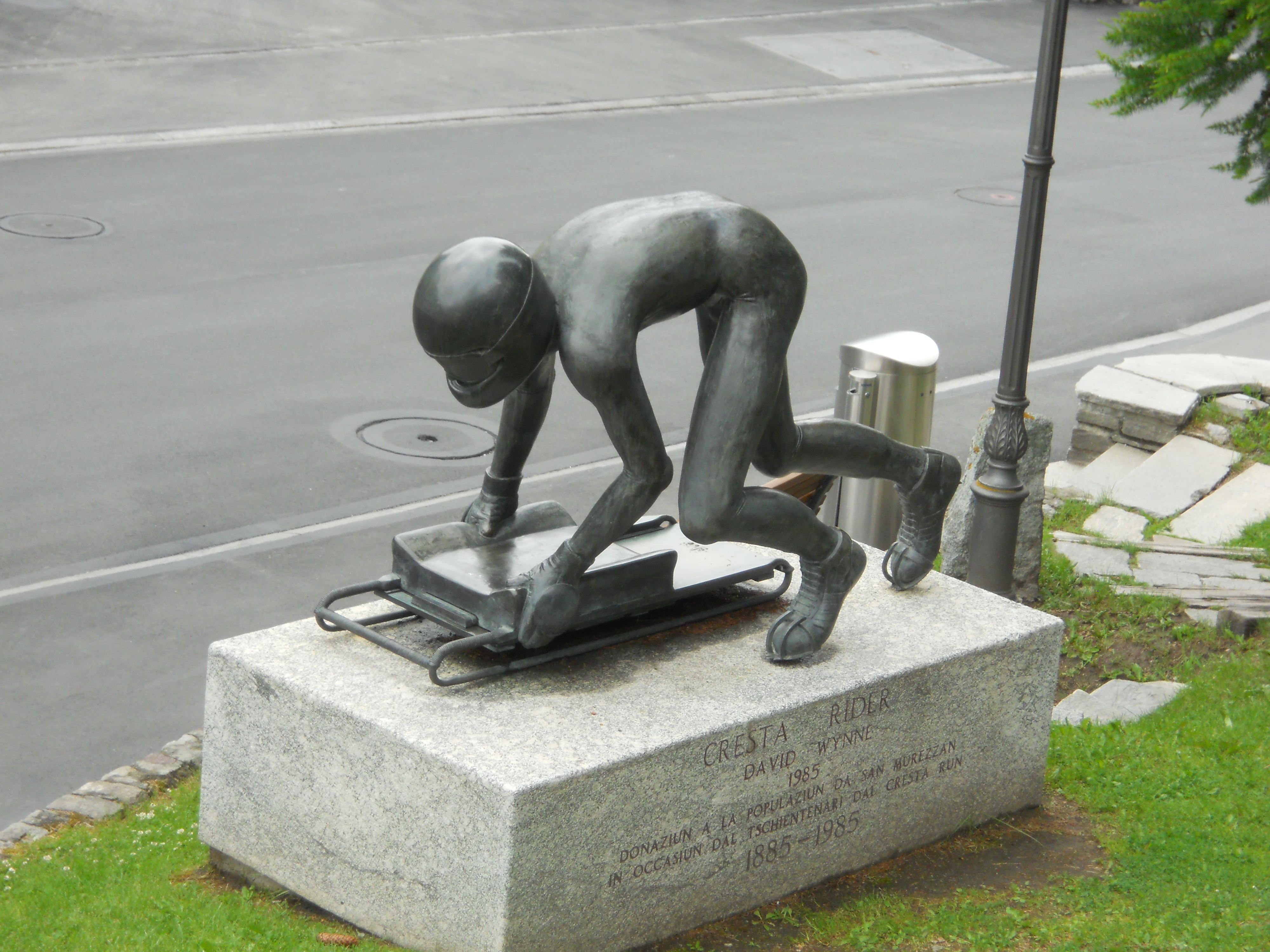 Scultura che celebra la Cresta Rider di David Wynn